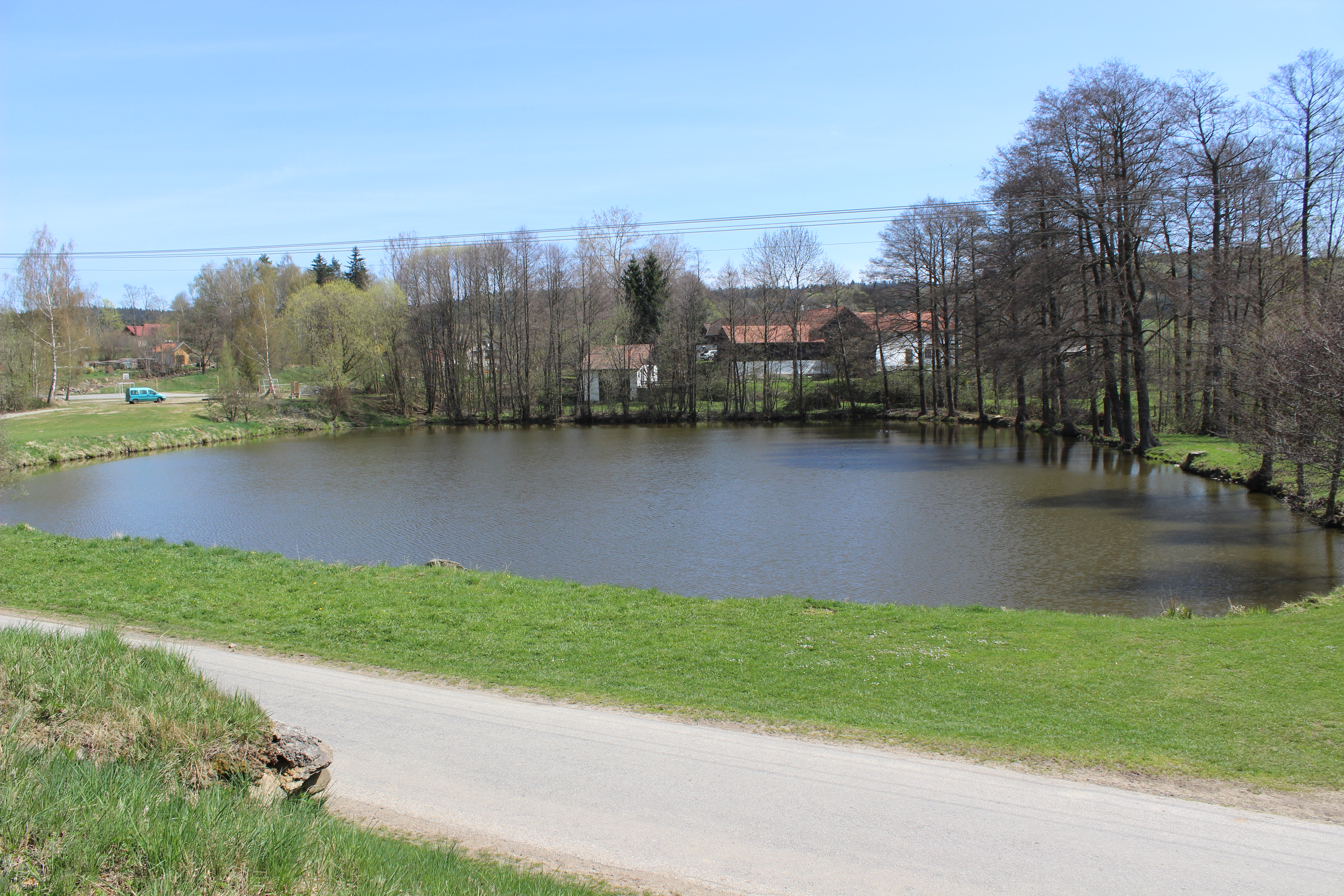 Rybník v Lešově. Project: Fotíme Česko.